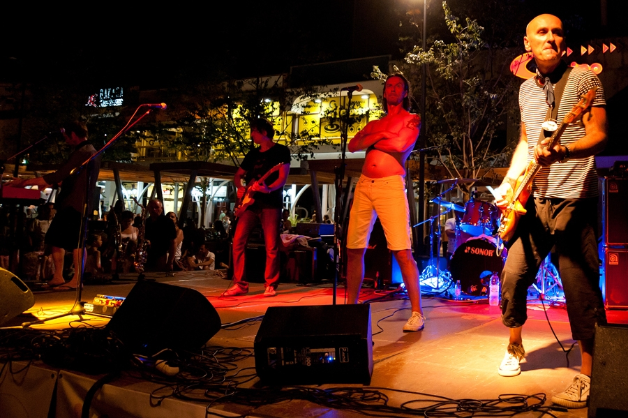 Davor Gobac i Psihomodo pop